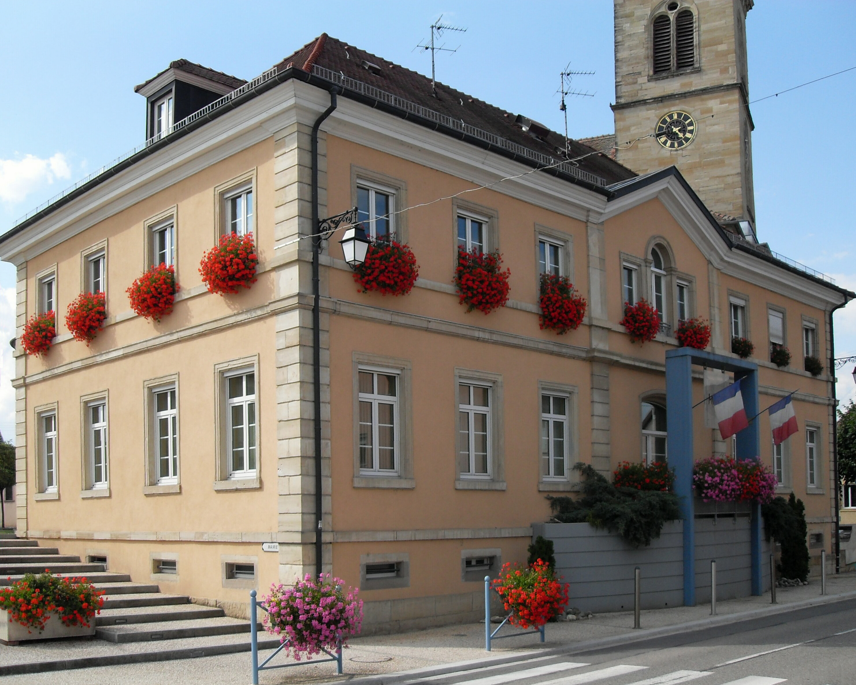 La mairie de Carspach